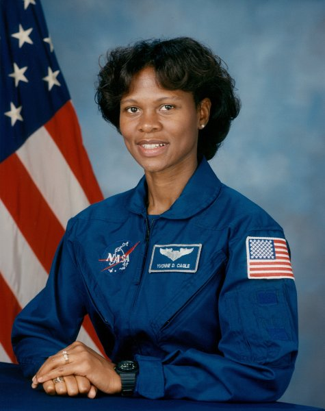 portrait astronaut Yvonne Cagle